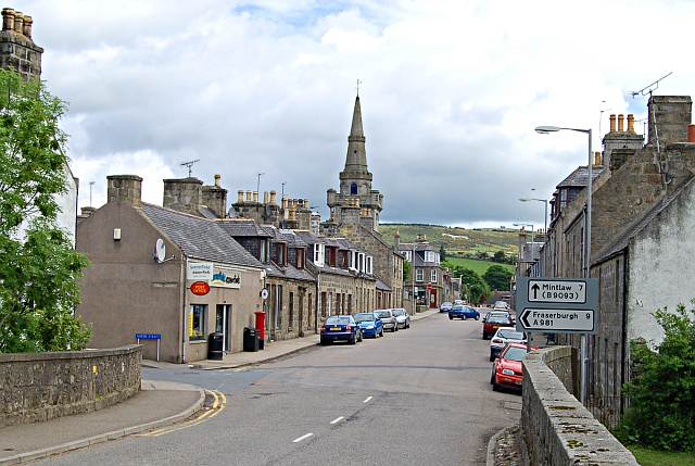 Bridge Street, Strichen, Aberdeenshire